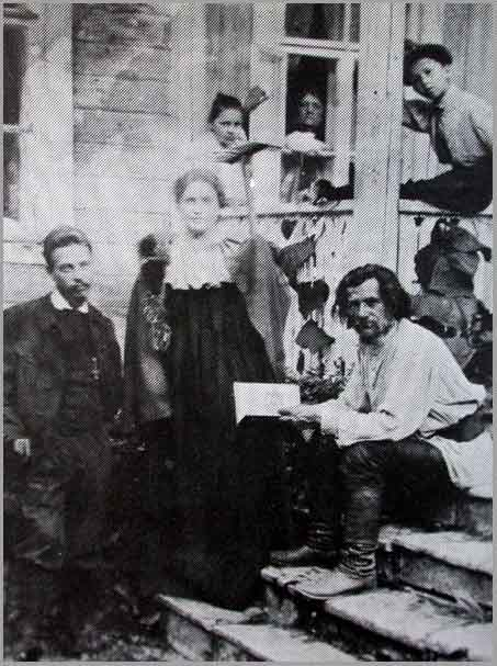 Lou Andreas-Salomé und Rainer Maria Rilke (links) mit dem Dichter Spiridon Drozin in Russland.